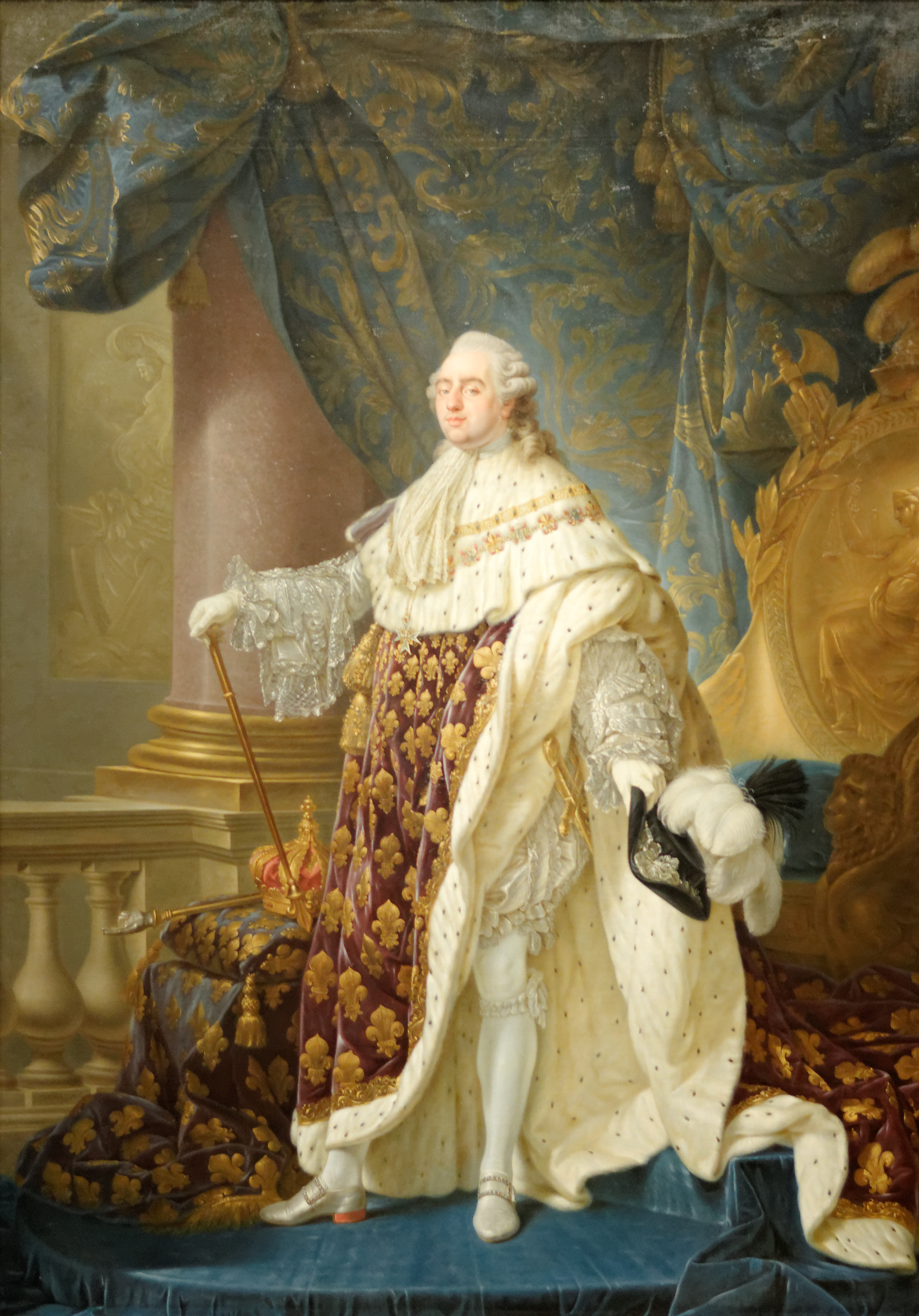 Le roi revêt le manteau du couronnement et la croix de l'ordre du Saint-Esprit. Cette version du exposée au Kunsthistorisches Museum de Vienne est est basée d'après l'original de Callet exposé au château de Versailles. N° inv 3444